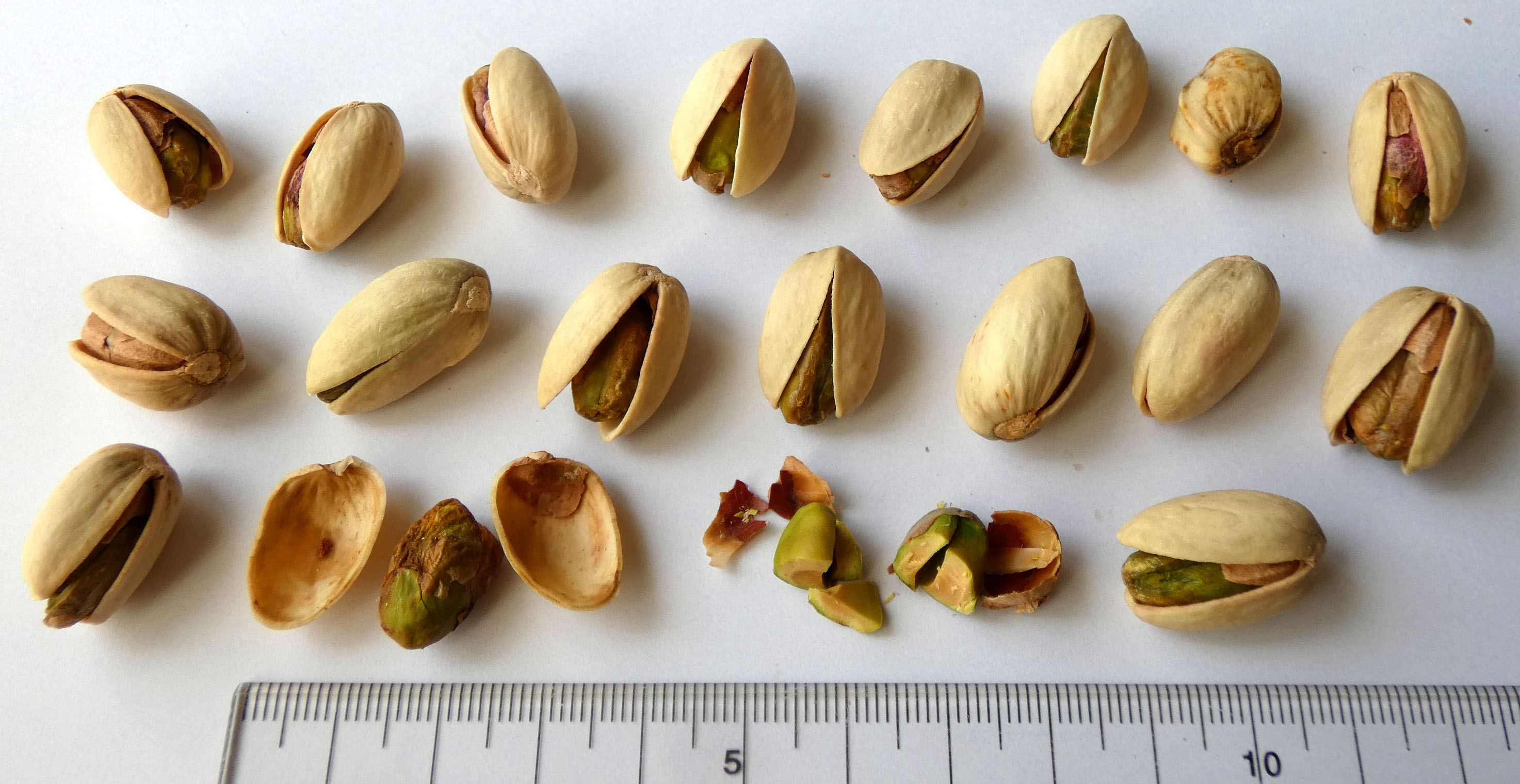 ピスタチオ（108円/27g）